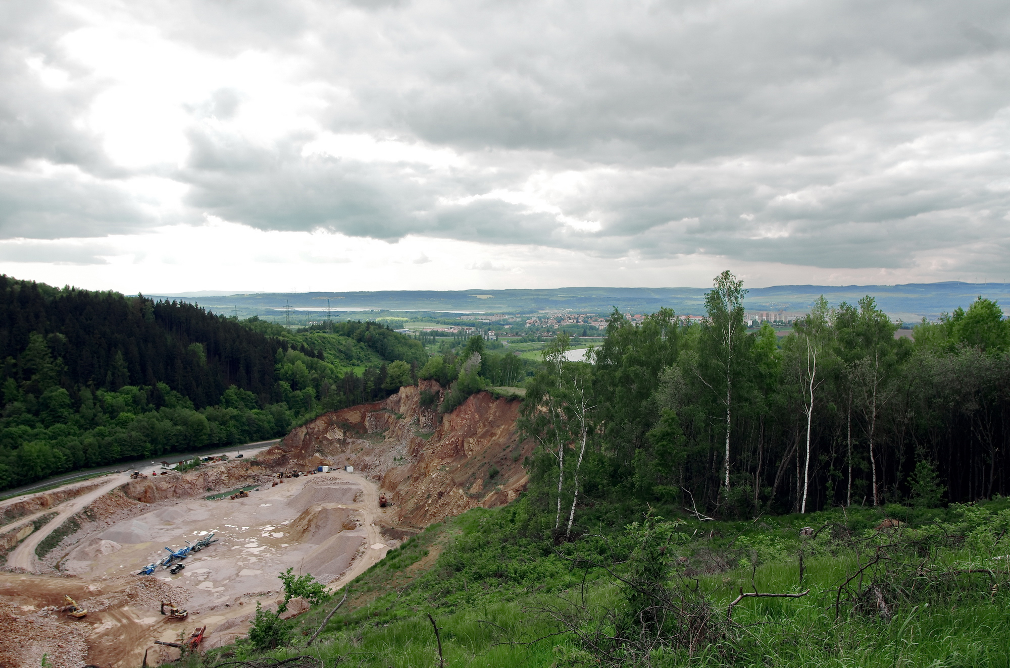 Žulový lom v zaniklé obci Vítkov (Sokolov), okres Sokolov